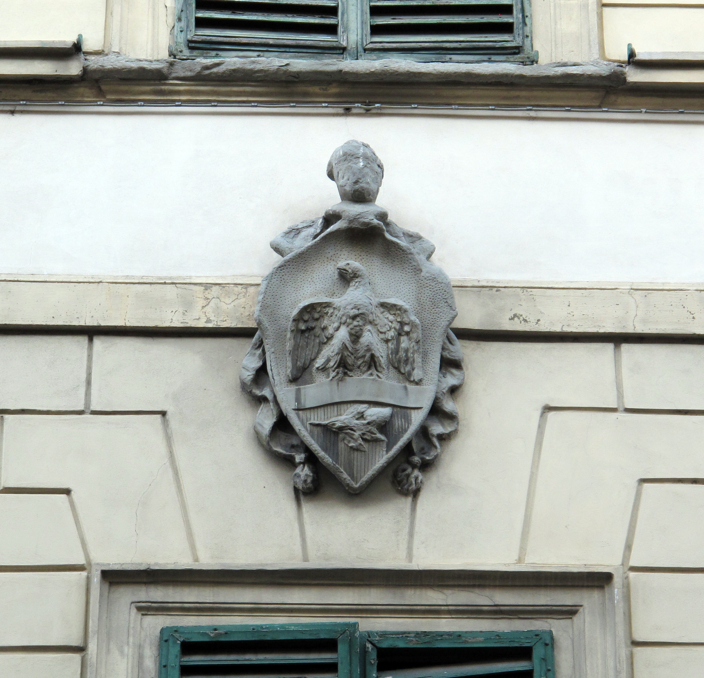 Palazzo Fossi 02 stemma